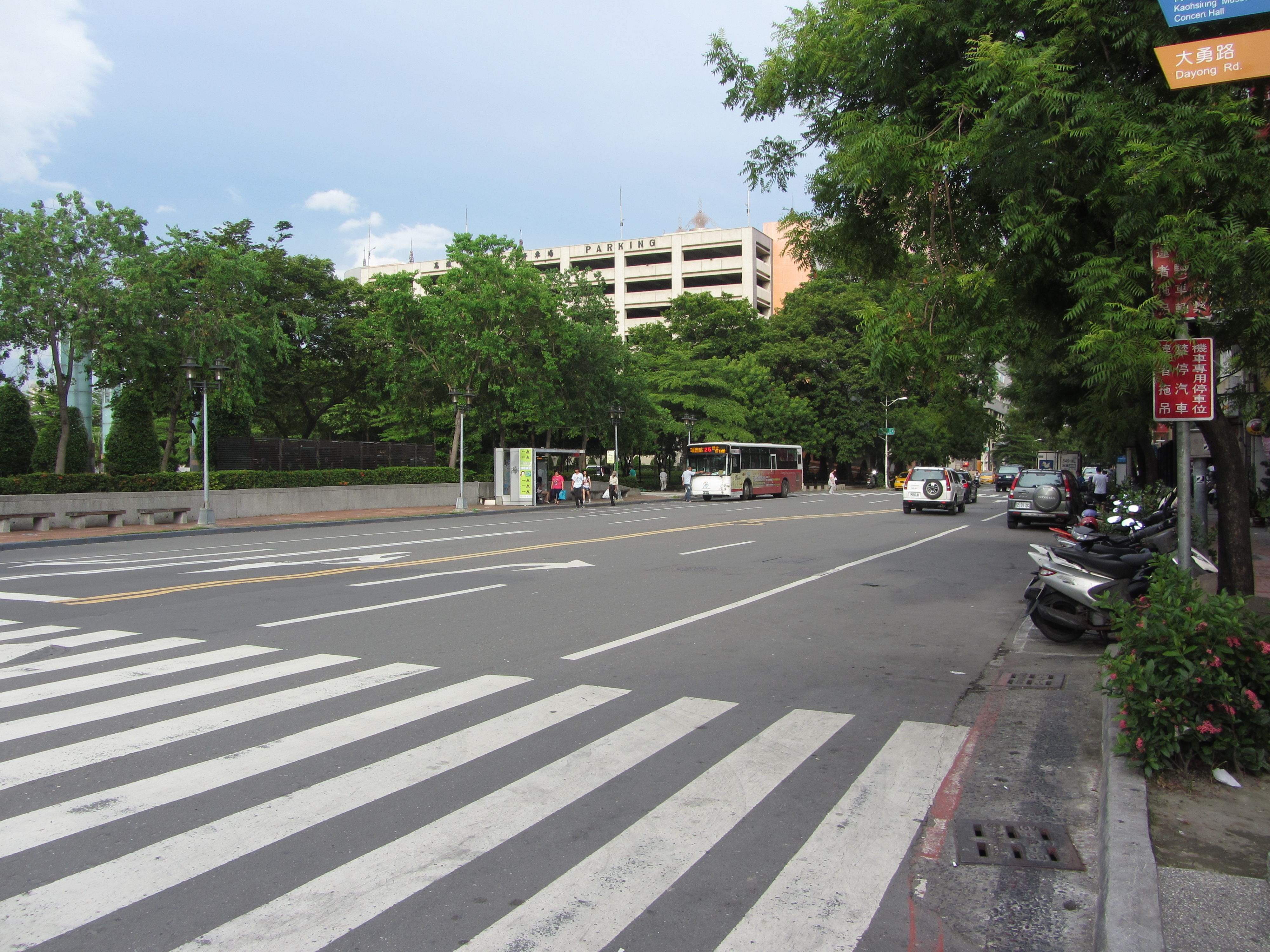 高雄市鹽埕區大仁路